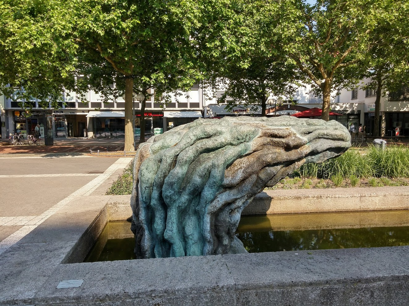 Brunnenplastik von Rolf Hartmann, die vor dem Wolfsburger Rathaus installiert ist